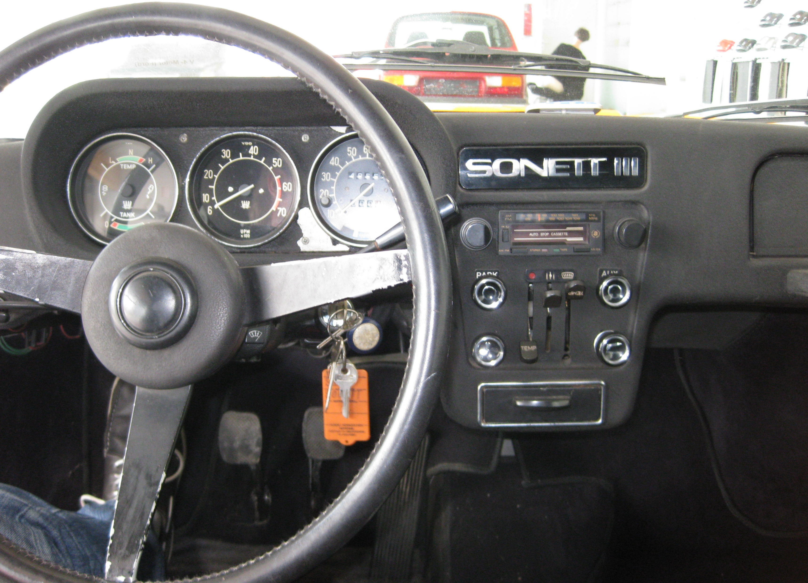 Cockpit eines SAAB Sonett III